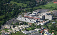 Vue d'ensemble de l'Hôpital Nord